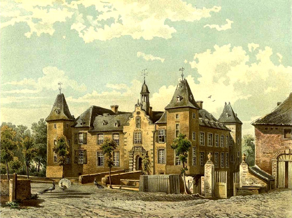 Haus Rath, Kreis Düren, Rhein-Provinz, Lithografie aus dem 19. Jahrhundert